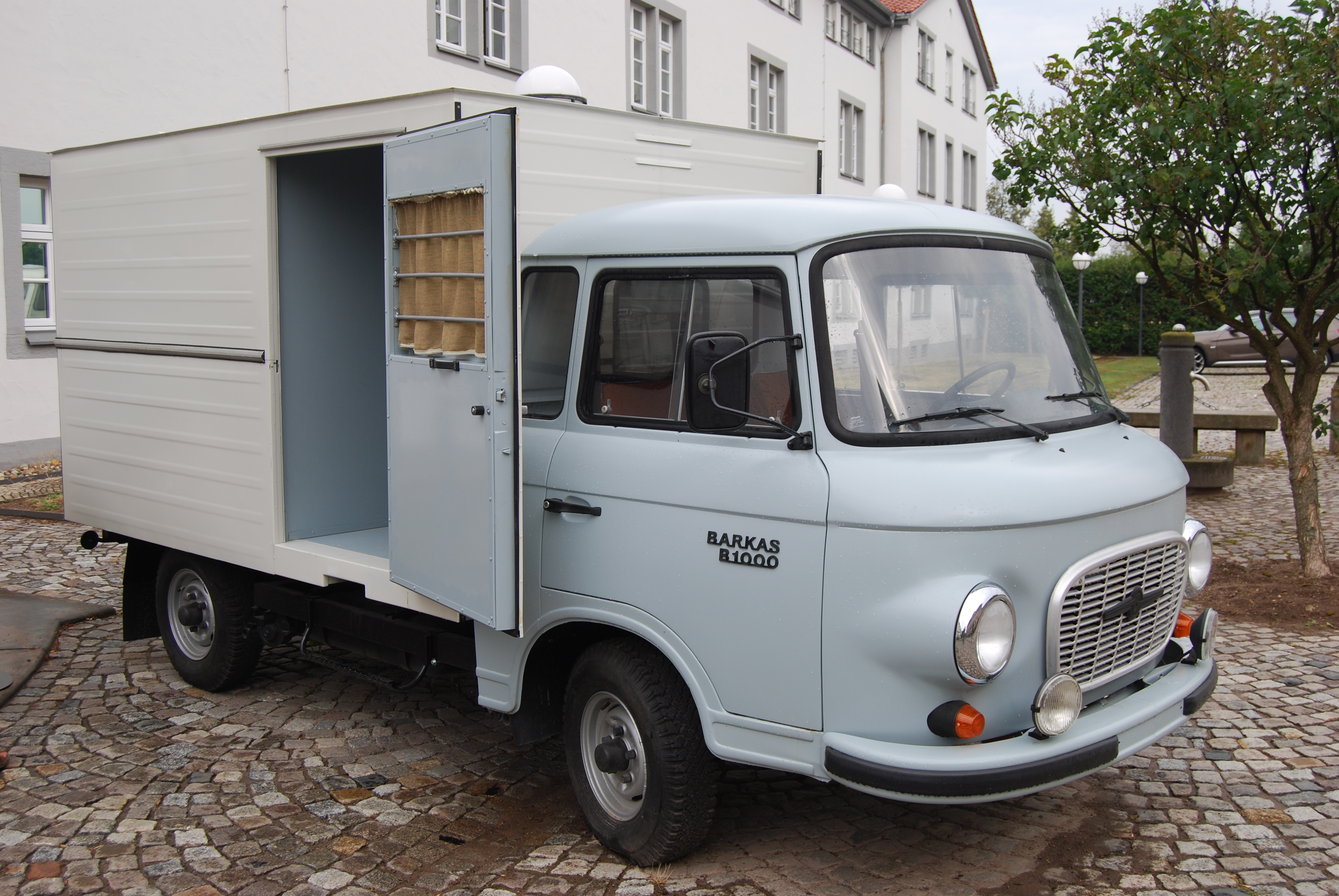 Gefangenentransportwagen (GTW) des Staatssicherheitsdienstes der DDR auf Basis eines Barkas B 1000 mit Leichtbaukoffer. Baujahr: 1984